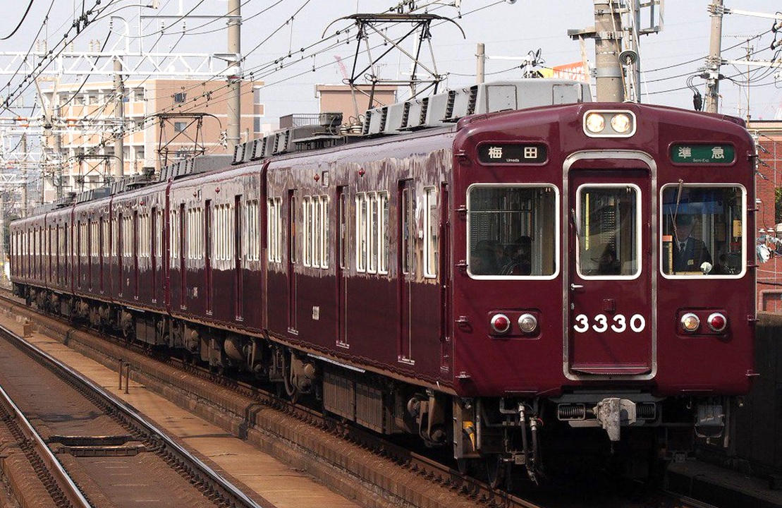 阪急3300系 準急梅田行き